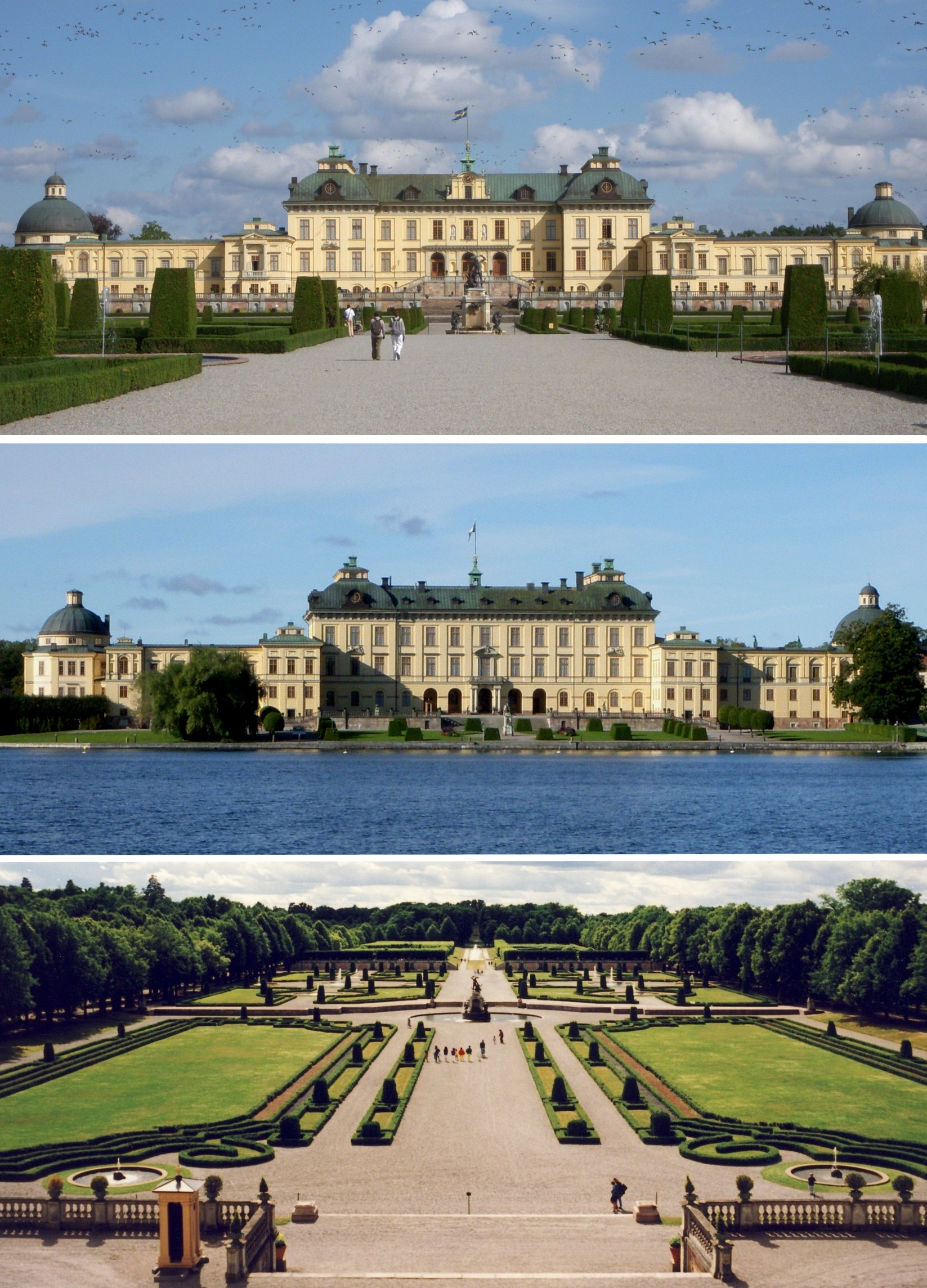 Kollage, Drottningholmsslott, fasad mot väst, fasad mot öst och barockträdgården mot väst